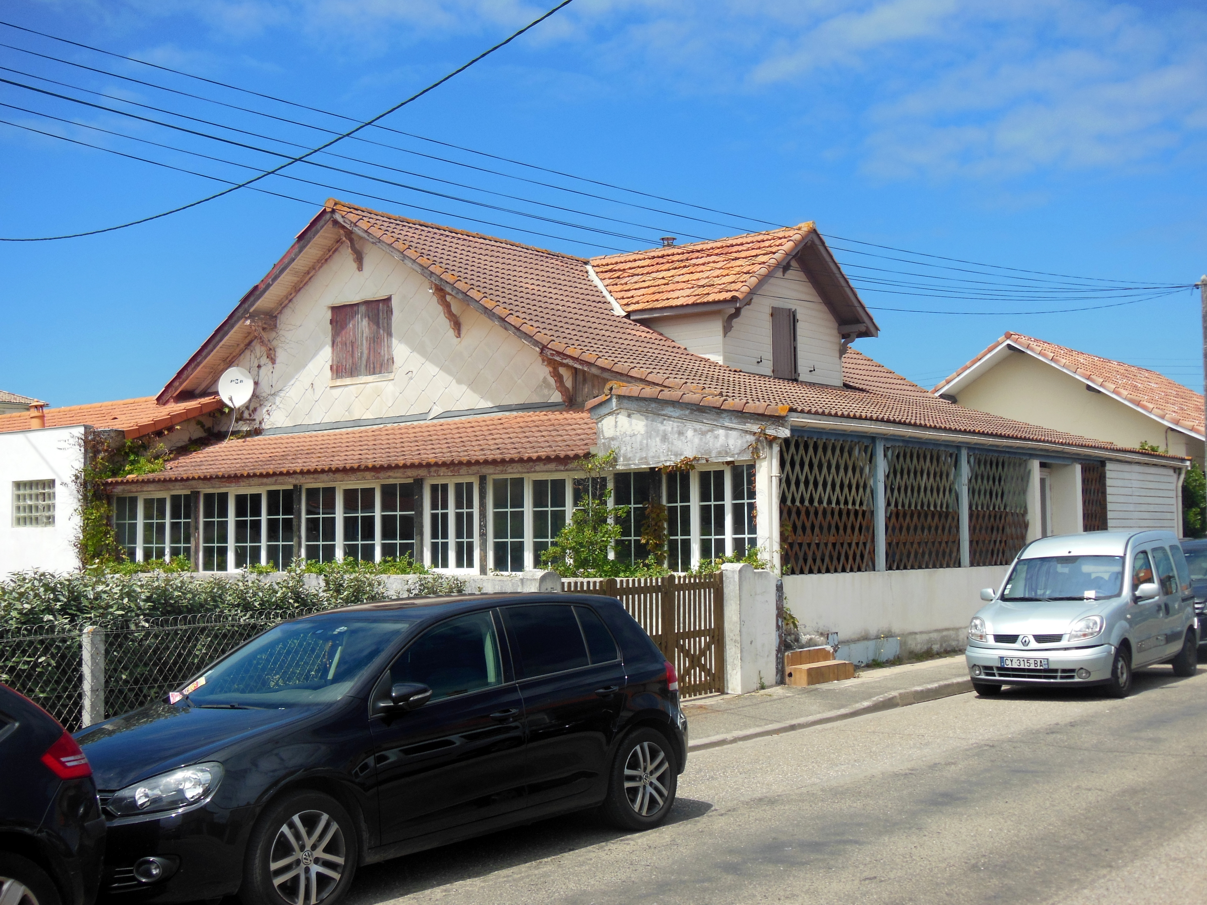 Maison située 19 rue du Vieux-Marché, à Mimizan-Plage (Landes, France). Ancienne épicerie, elle sert de maison de tolérance pendant l'occupation allemande en France